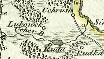 Łukówek (powiat chełmski) na mapie Galicji Zachodniej, 1803 r.